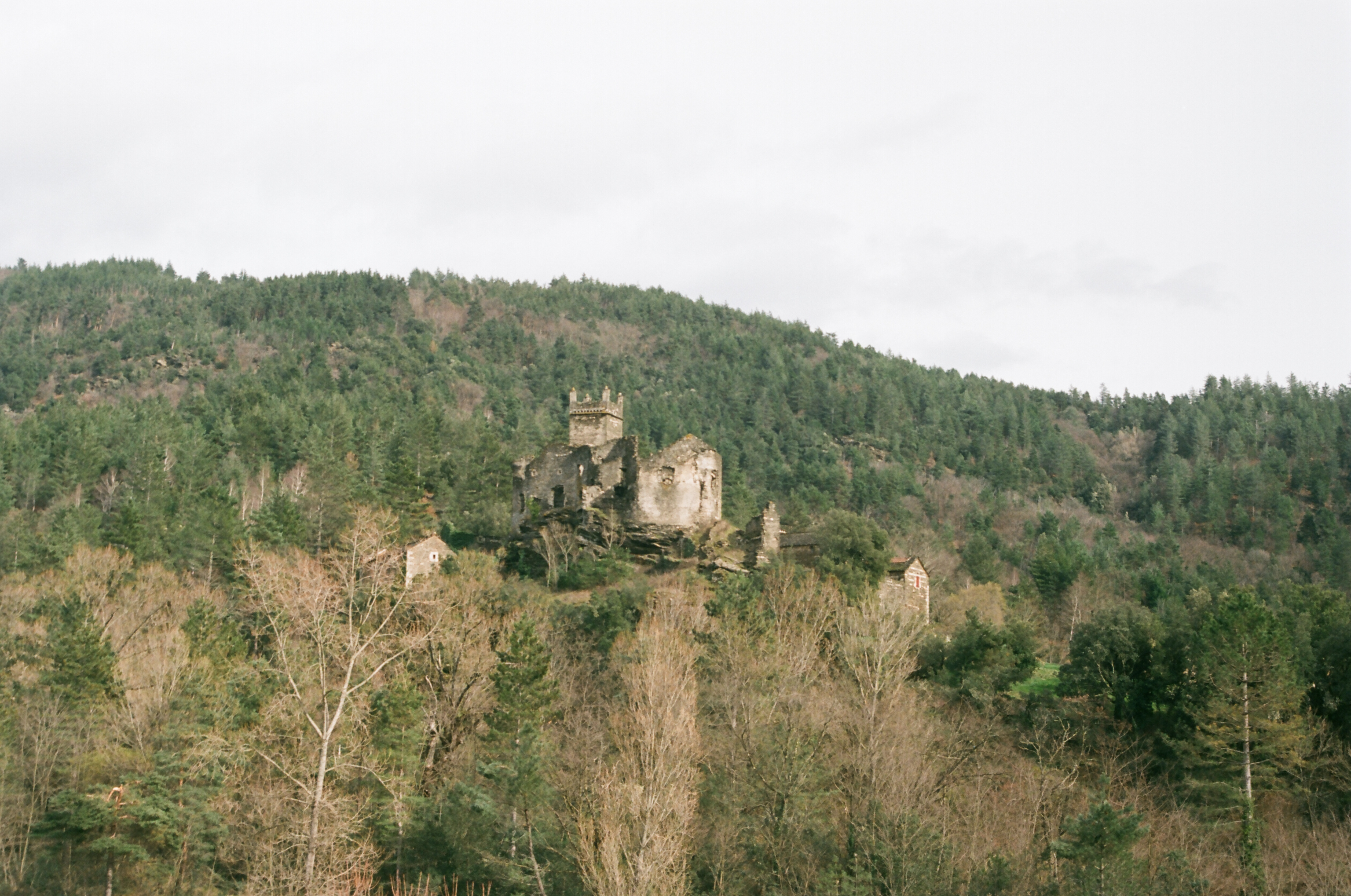 Château de Brésis (Gard)